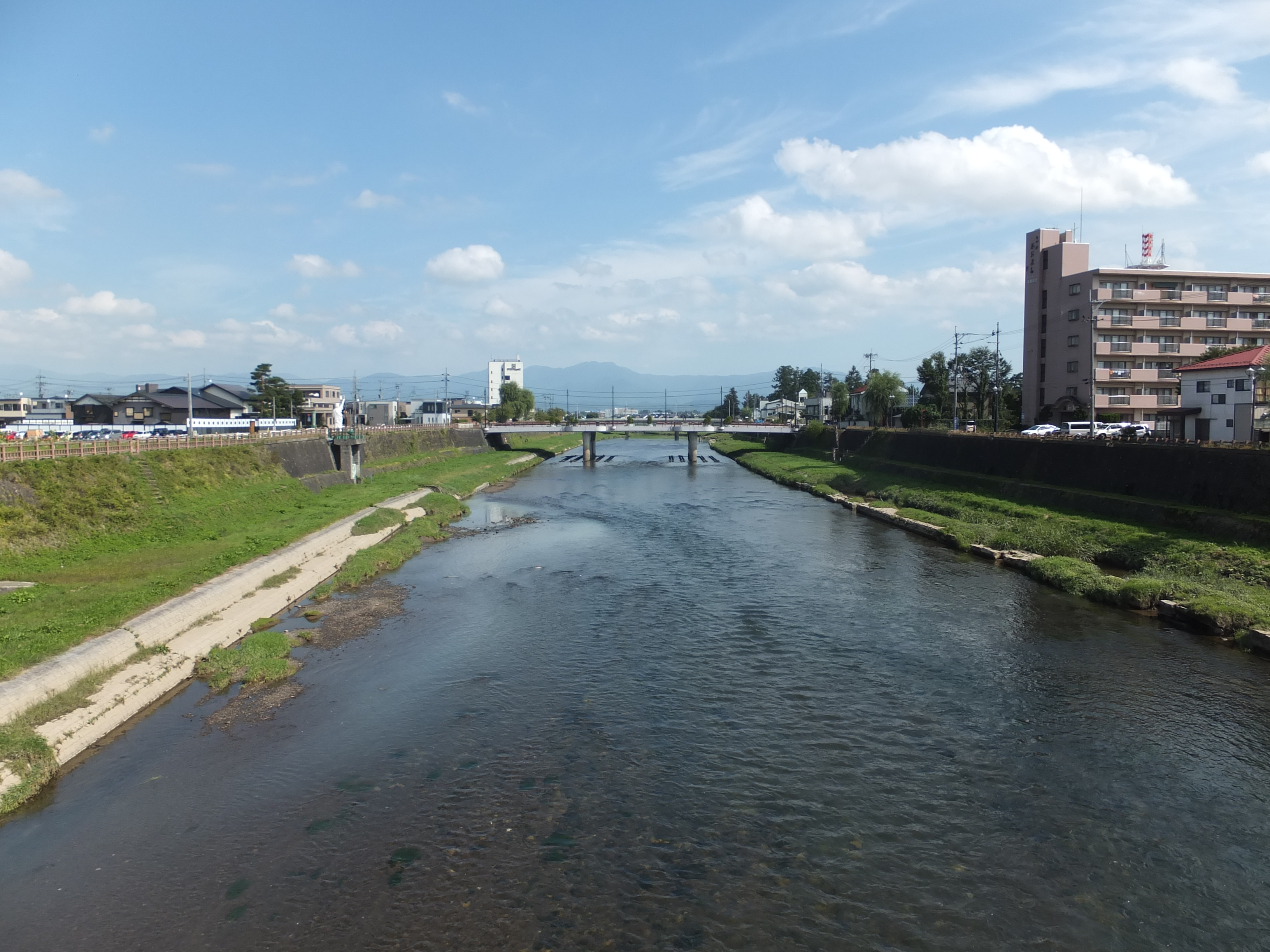 大盛橋から見た丸子川（秋田県大仙市）